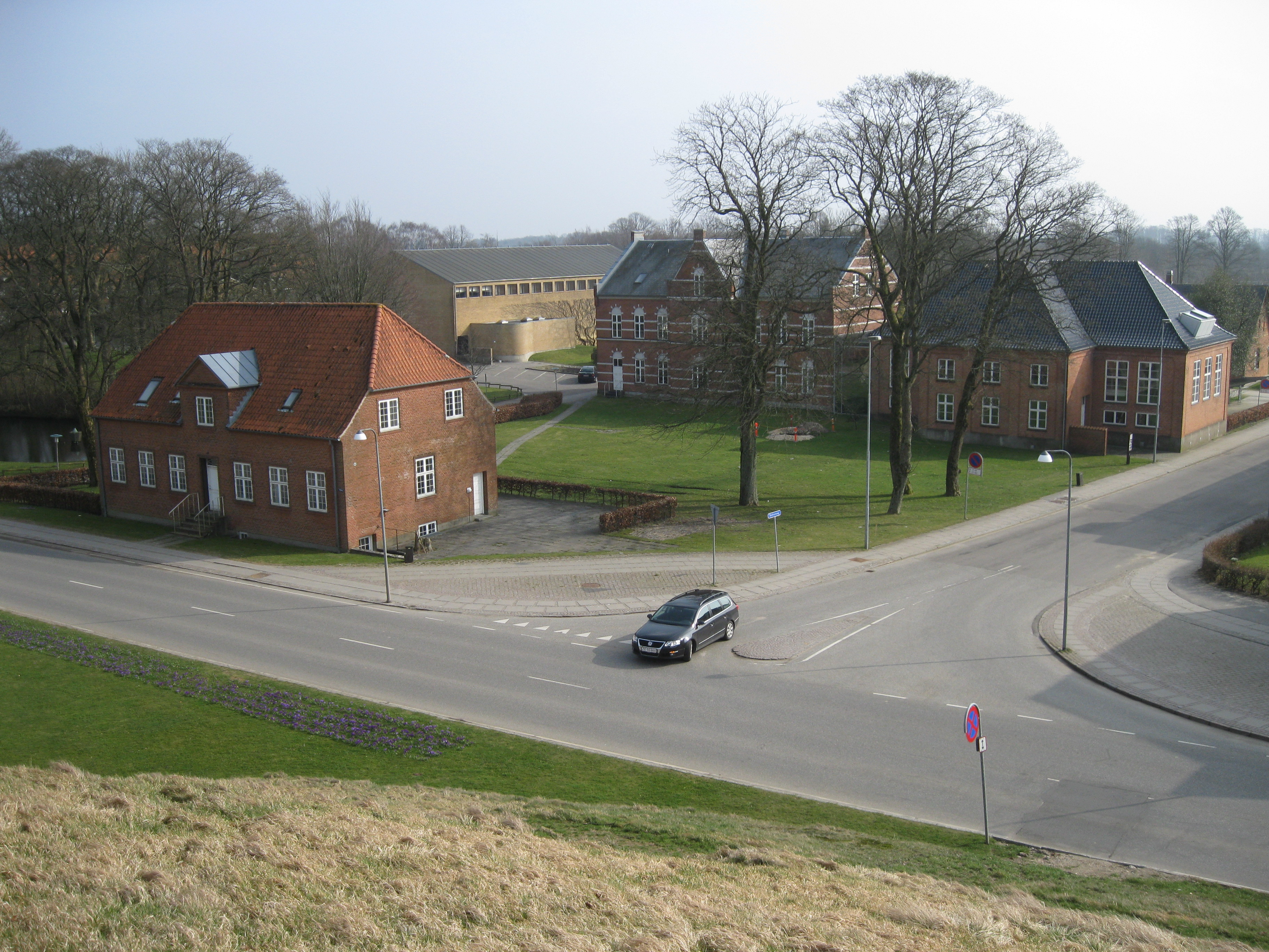 Jelling Statsseminarium